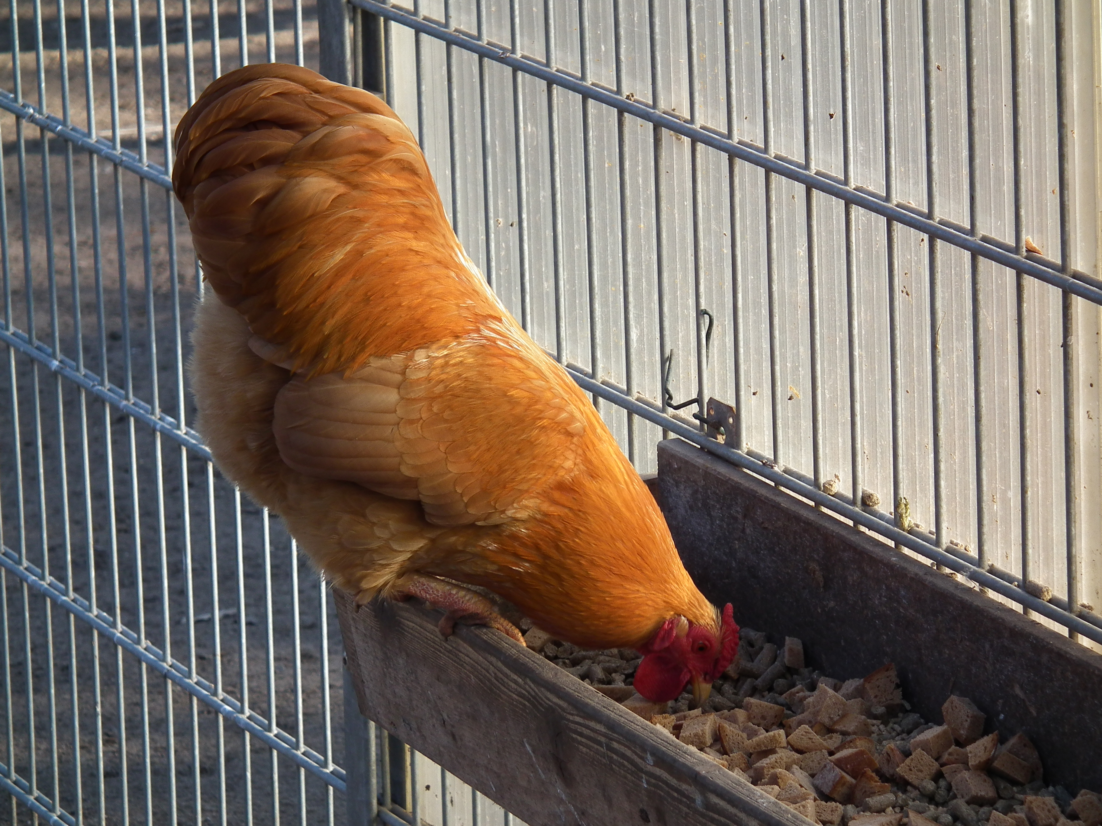 Haushuhn am Futtertrog, fotografiert im Vogelpark Birkengarten in Lorsch (Hessen, Deutschland)